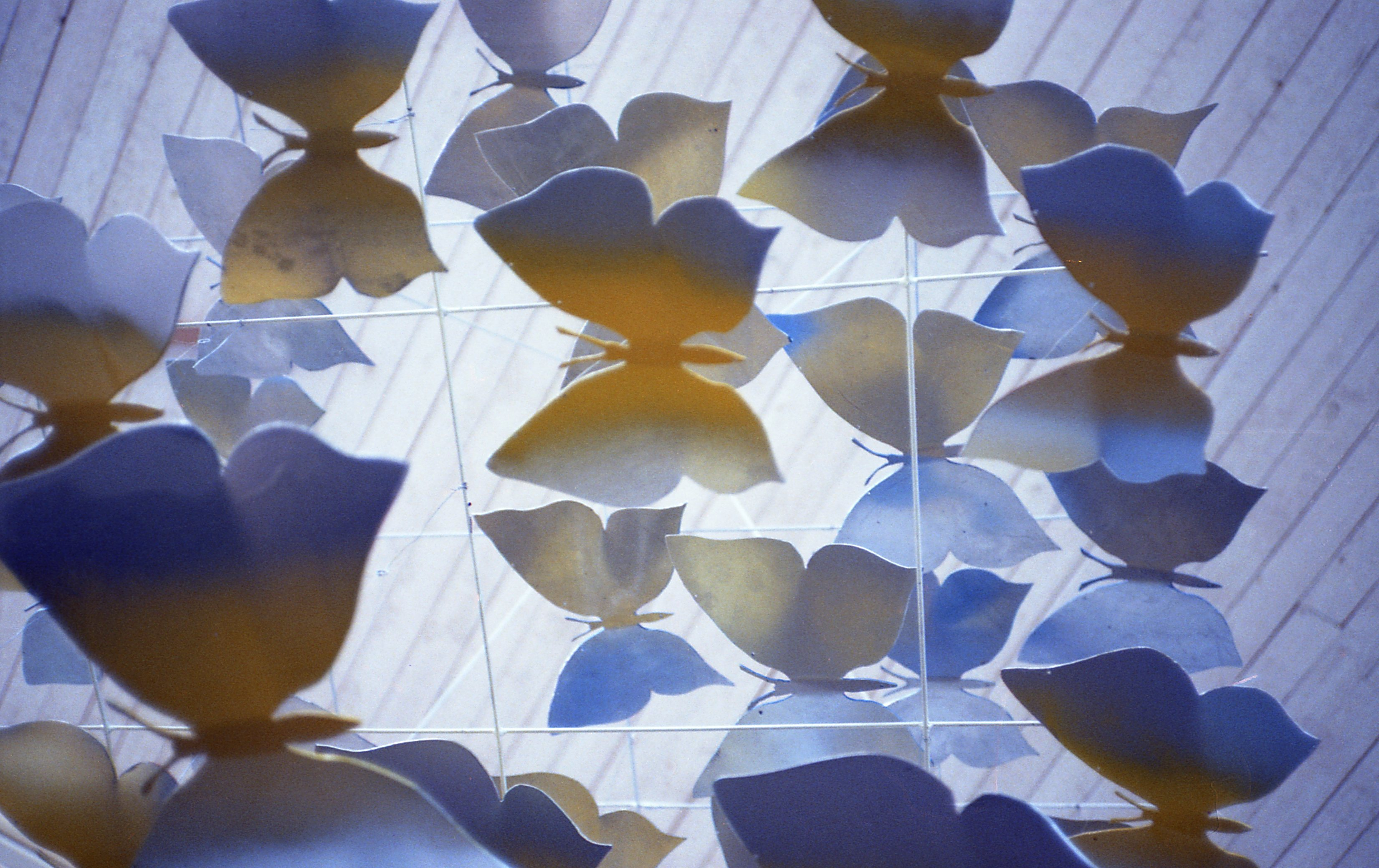 Alf Olsson, Fjärlismobil, lackad aluminium, Östa gymnasiet, Umeå